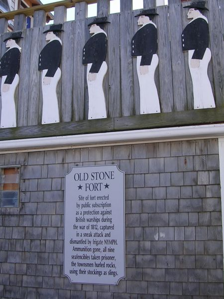 Plaque at Rockport, Mass.